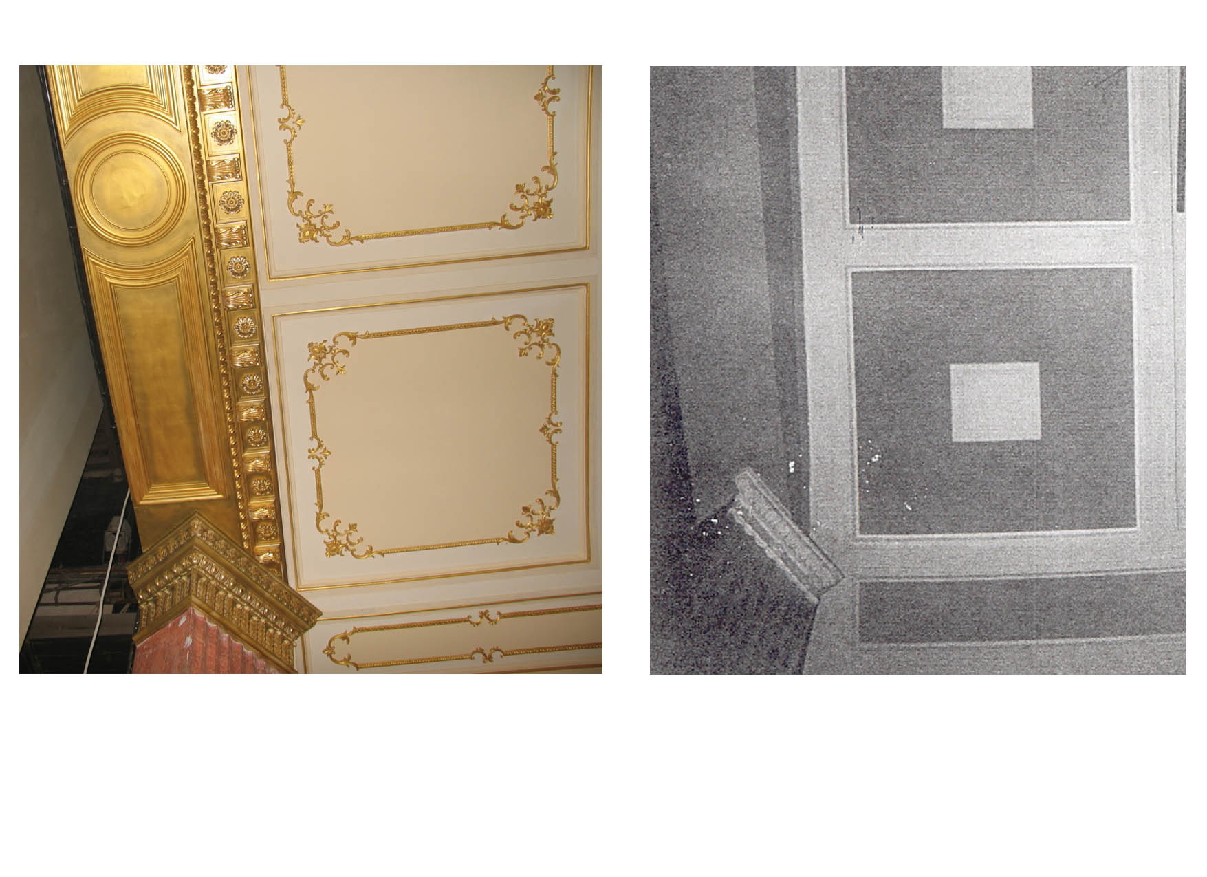 Клуб фабрики "Свобода" (Внутренние помещения. Сцена.) после и до реставрации "Интэс"